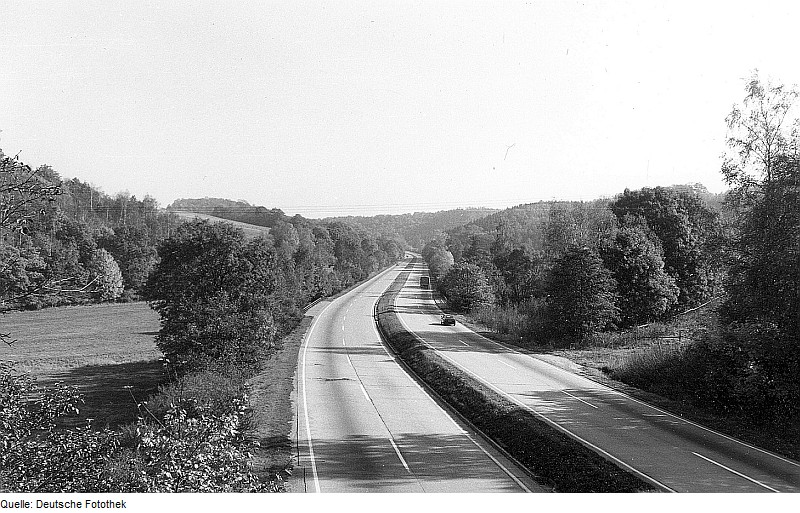 Original image description from the Deutsche FotothekTriebischtal-Tanneberg. Autobahn bei der Dammmühle